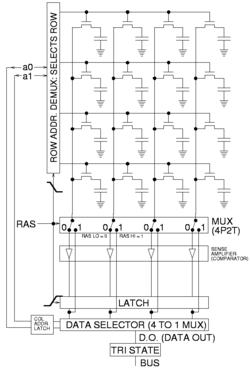 принципи за операција за читање четири од четири ДРАМ